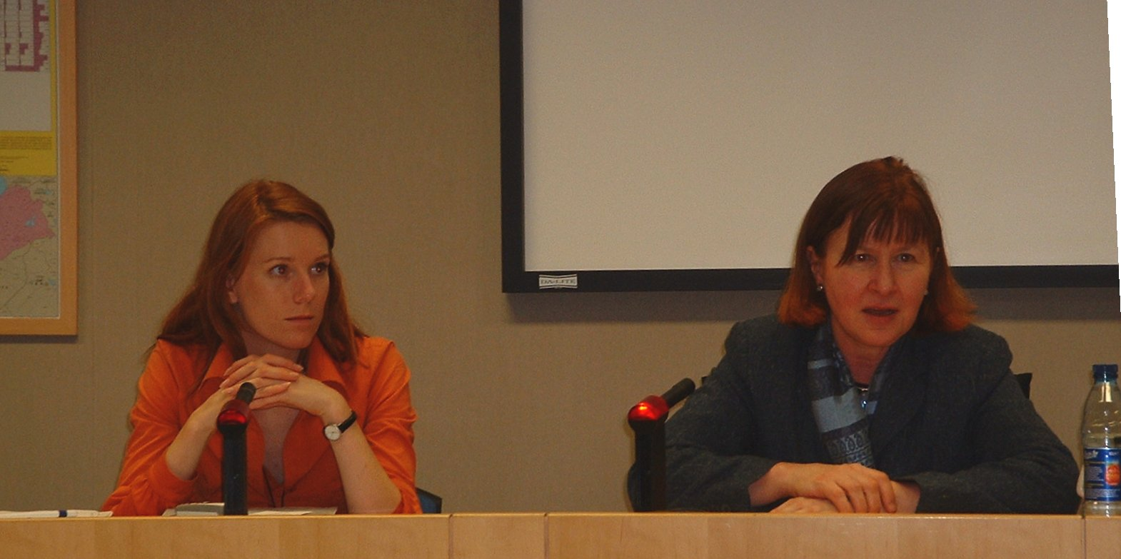 Heide Rühle and her assistant, Janna Schönfeld; European Parliament, BrusselsJanna Schönfeld and Heide Rühle